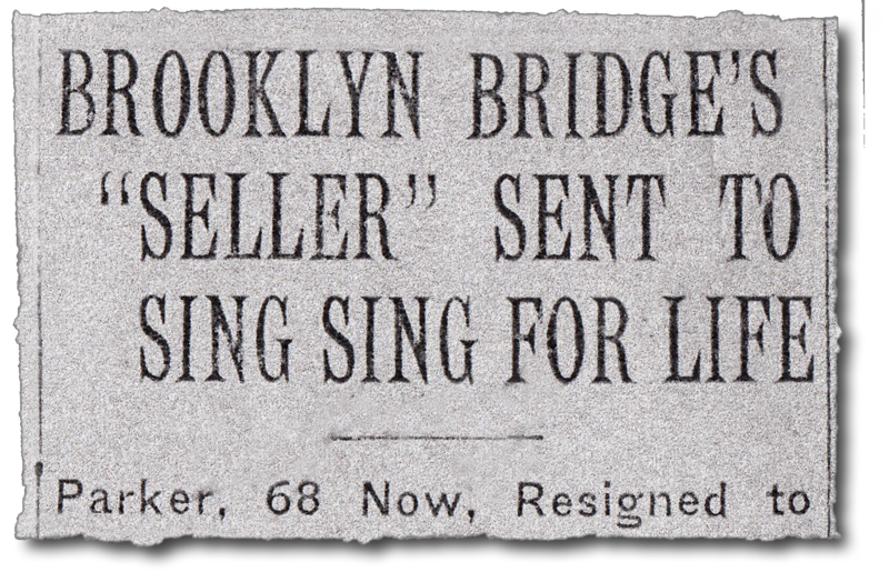 Lebenslang Sing Sing für George C. Parker Date 29 July 2013, 21:47:50 Source Zeitungsüberschrift, NY Times 23. Nov. 1928 Author nicht identifizierbar Modification of "Parker 02.png" (pencil traces removed)